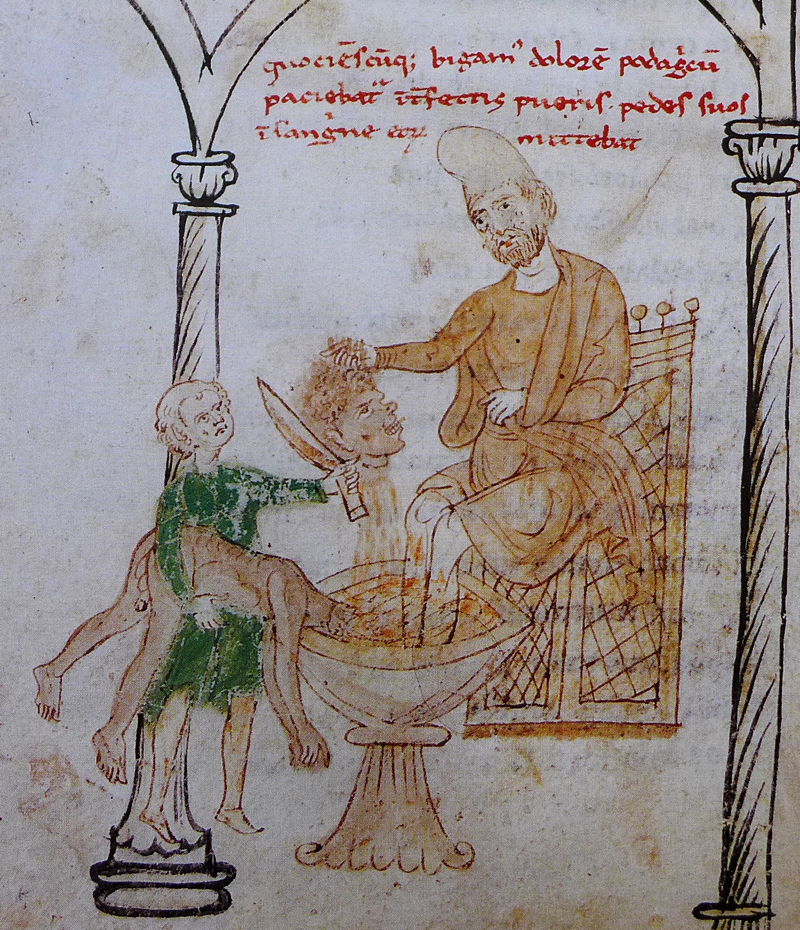 Matthew of Ajello